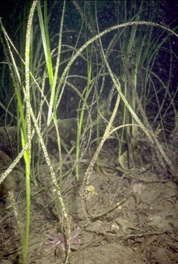 eelgrass